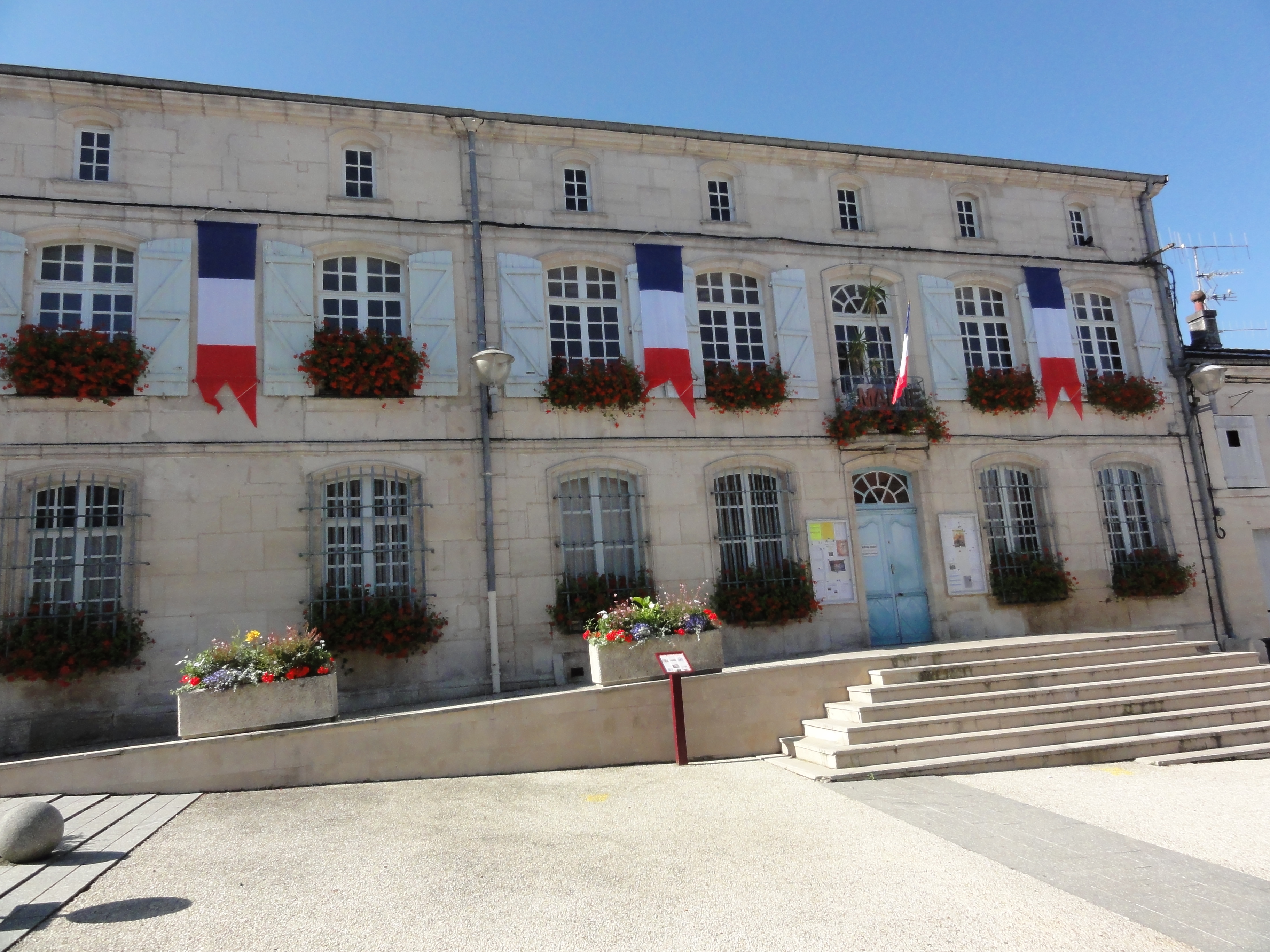 Ancerville (Meuse) Mairie